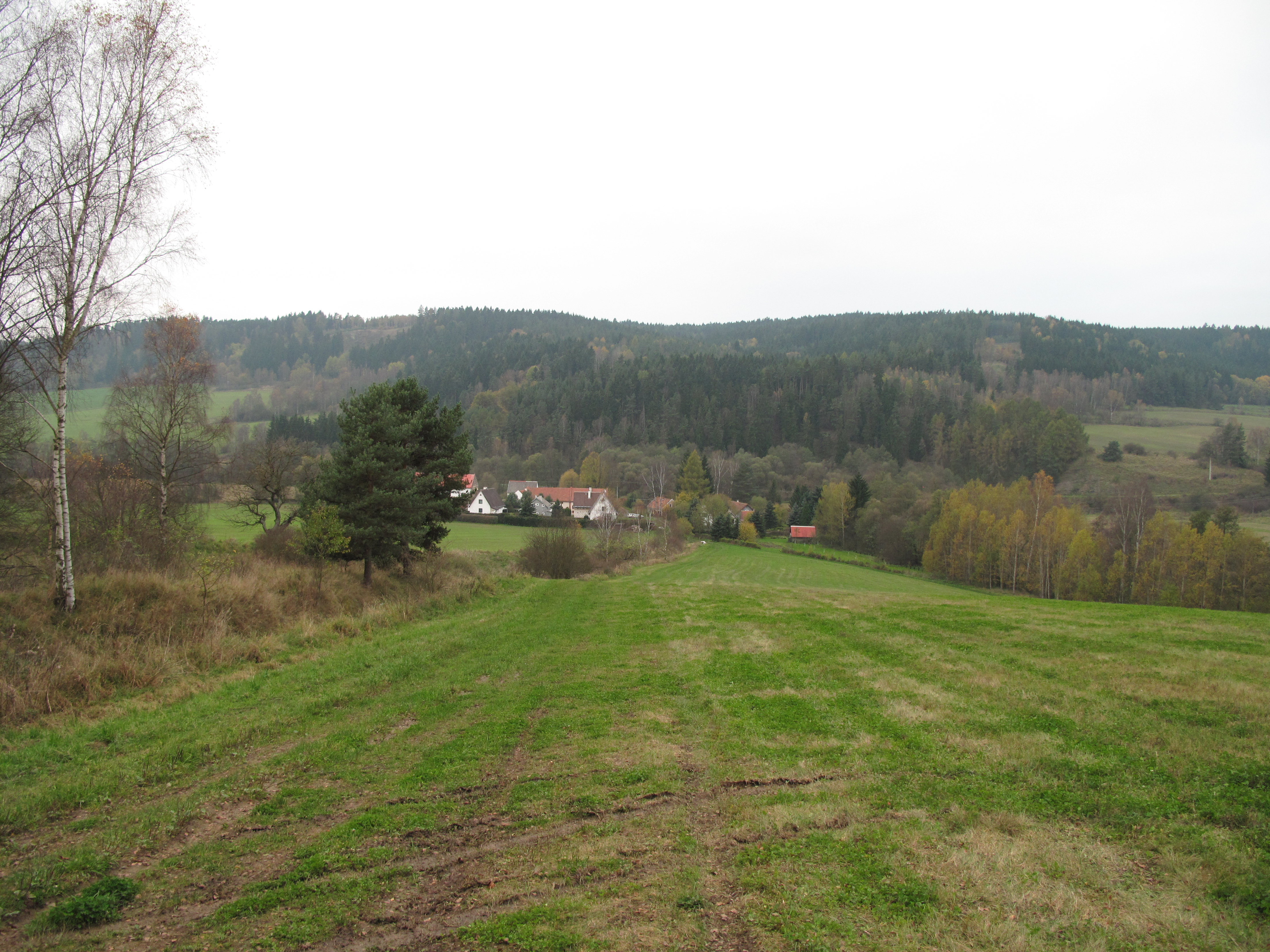 Poříčí z kopce. Okres Karlovy Vary, Česká republika.